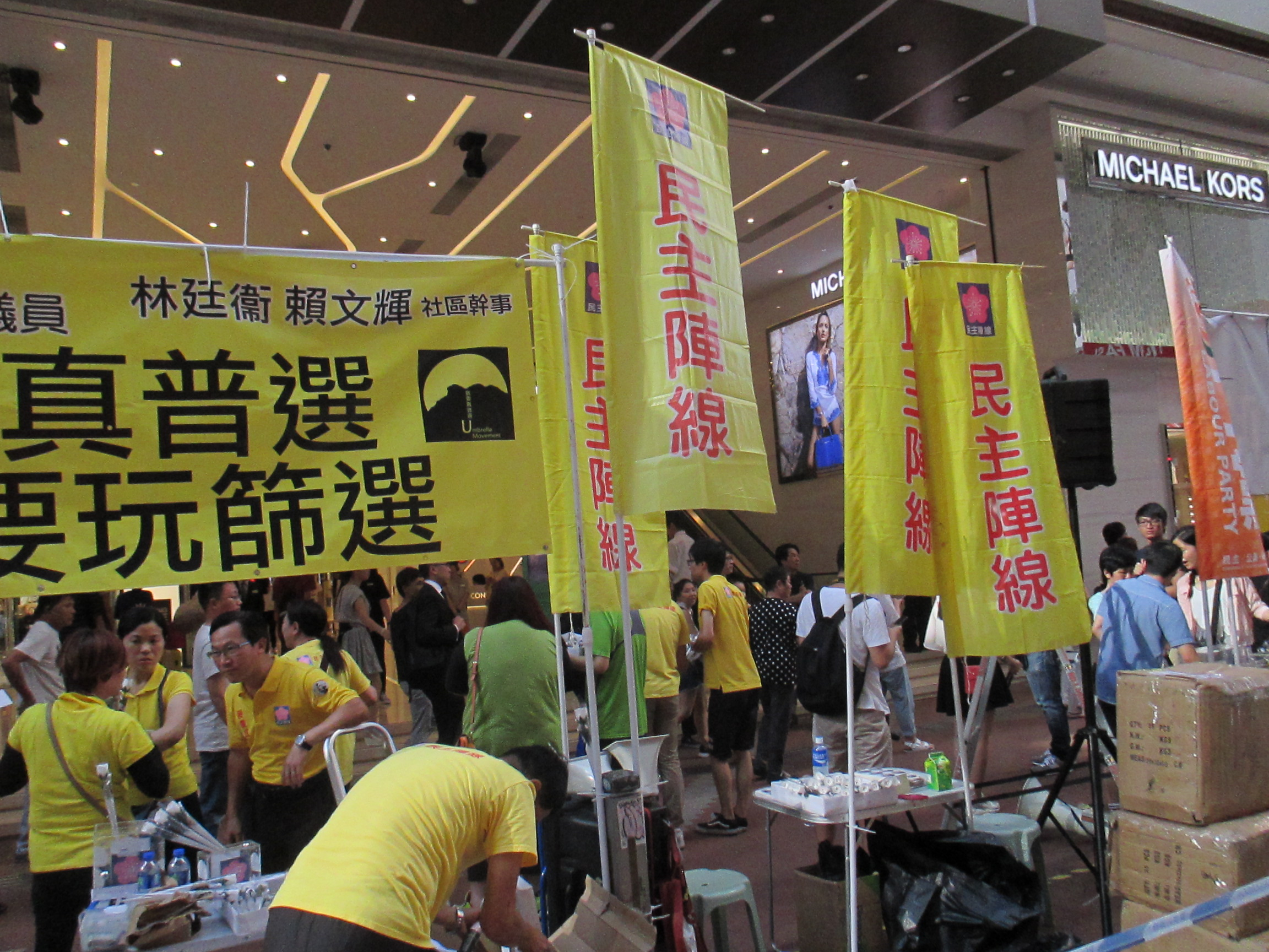 2015年六四，元朗天水圍民主陣線在銅鑼灣紀利佐治街開街站。麥業成議員。